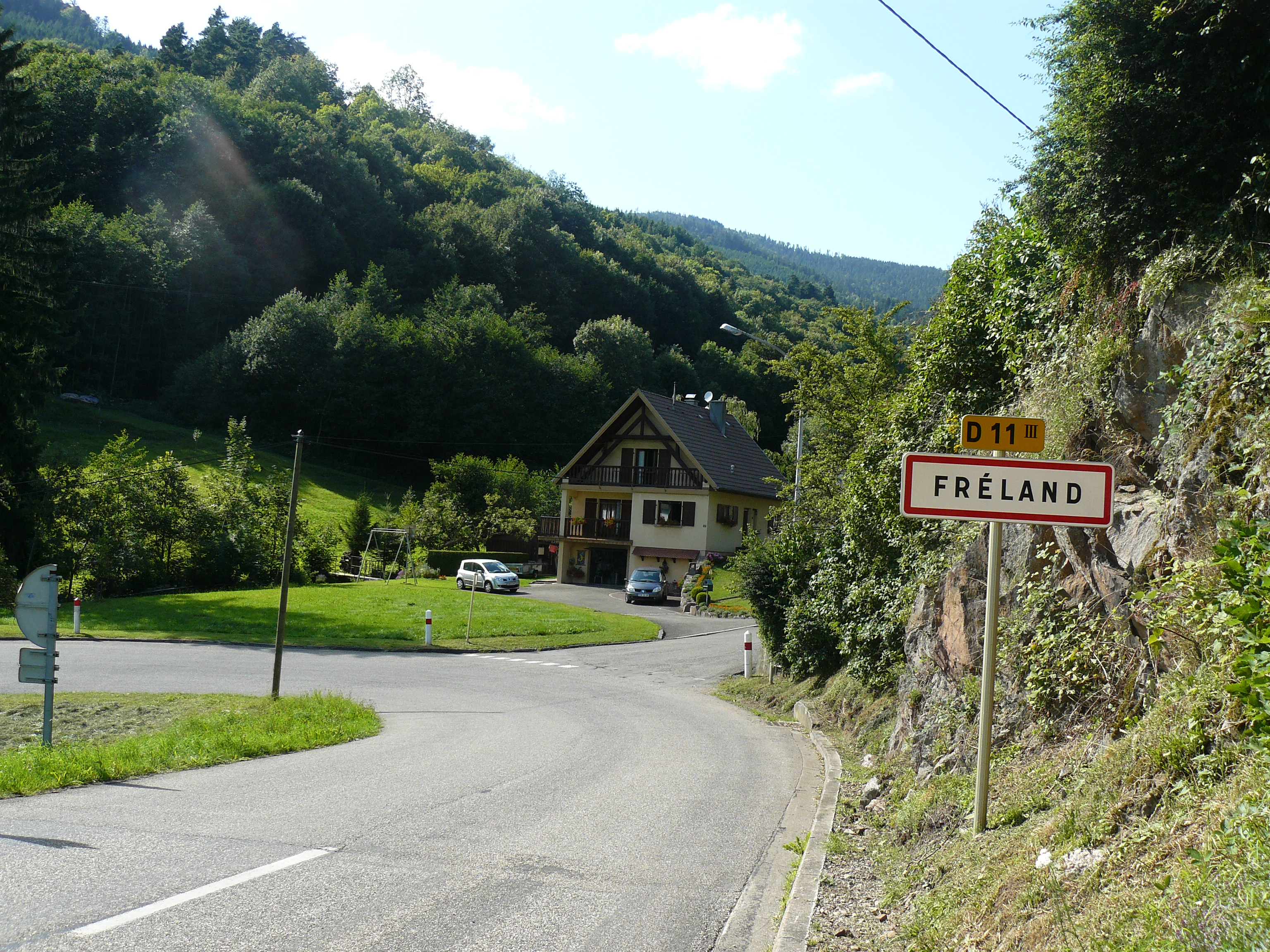 Entrée de Fréland en venant d'Aubure